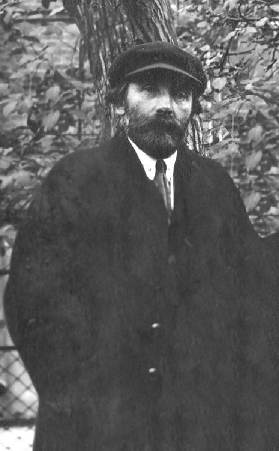 Ботаник М.И. Назаров